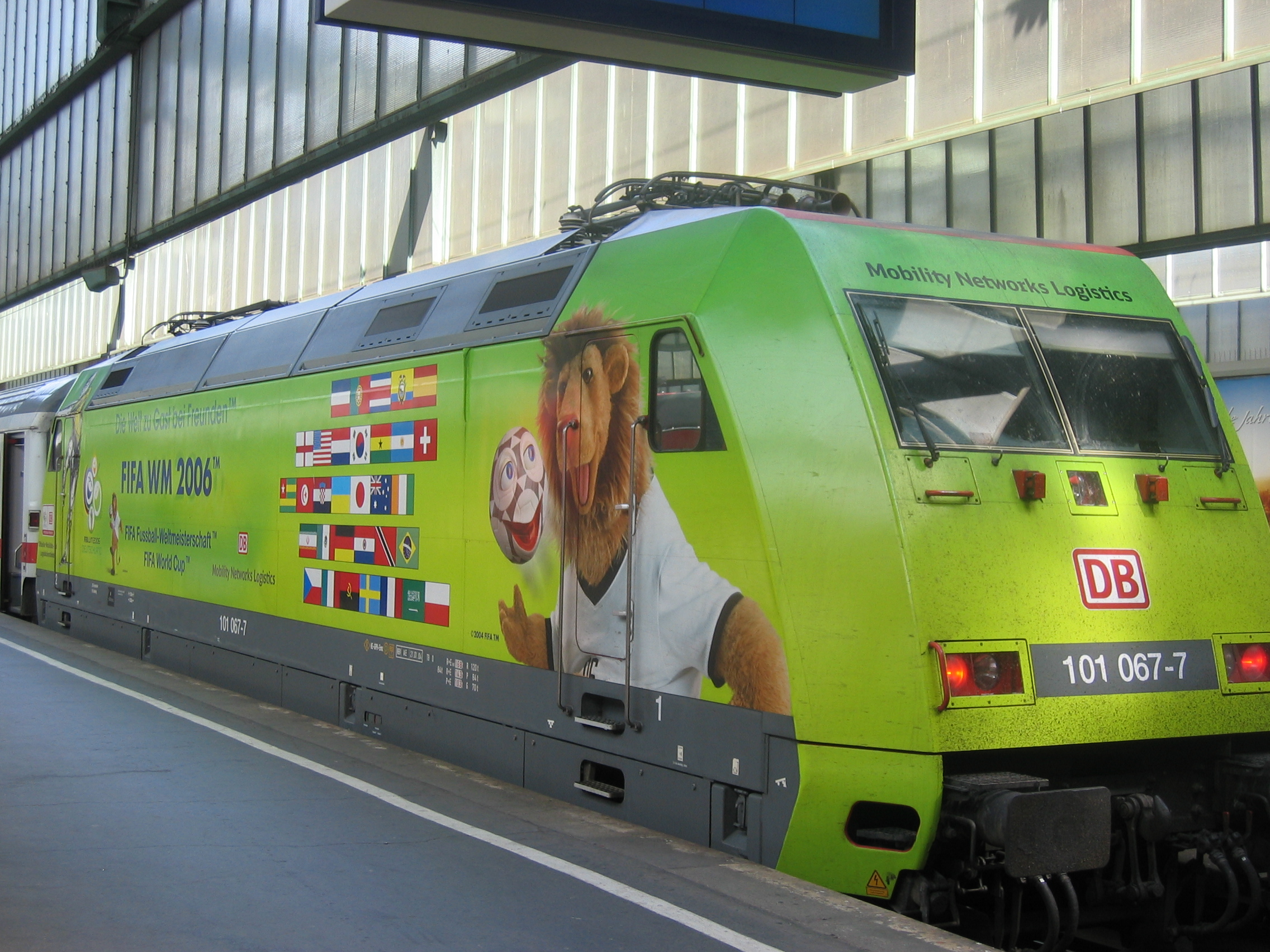 WM-Zug: Passend zur WM gestalteter Zug mit den Flaggen aller 32 teilnehmenden Teams, dem Slogan "Die Welt zu Gast bei Freunden", dem Logo und dem Maskottchen Goleo.